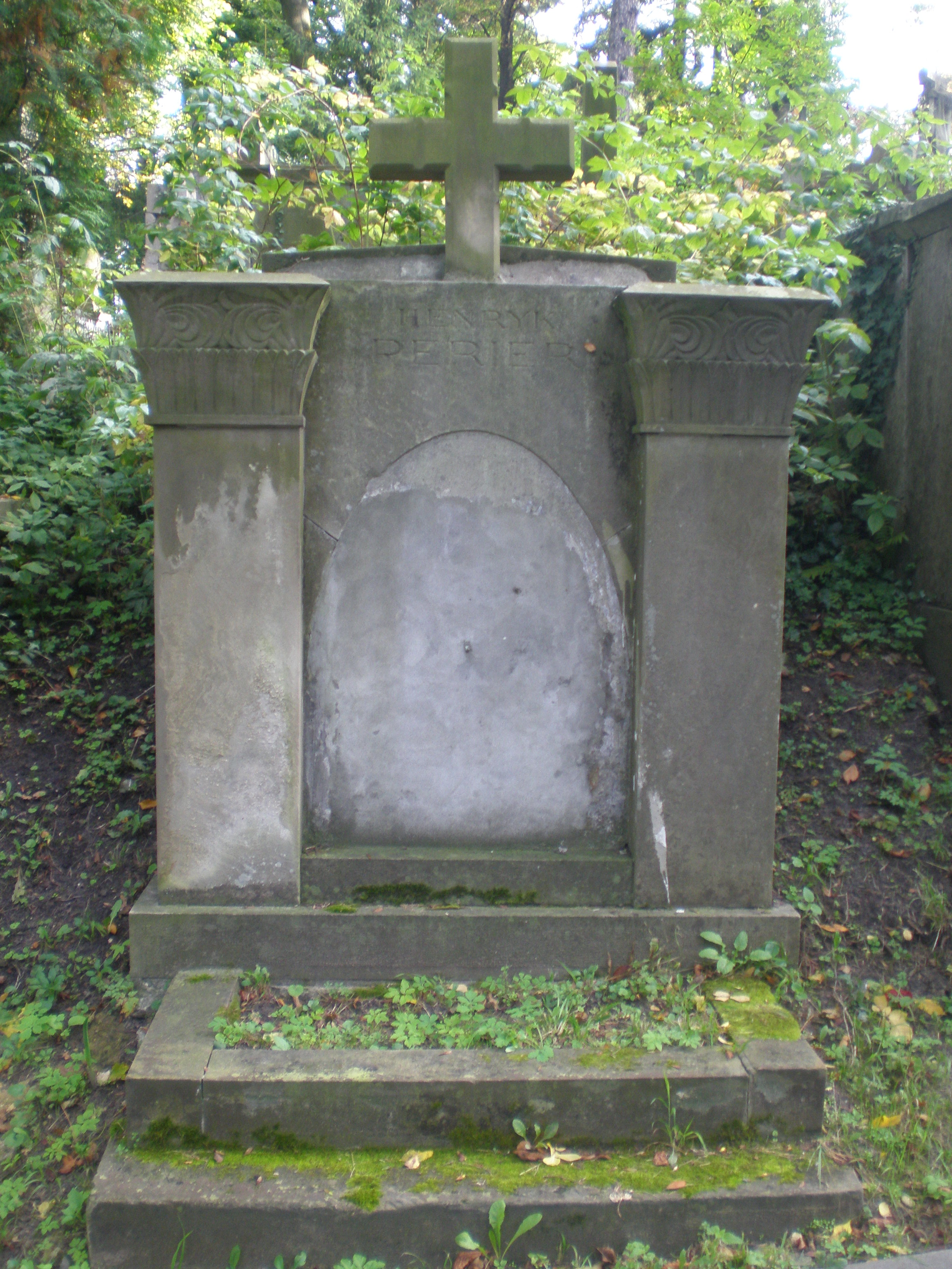 Nagrobek Henryka Karola Periera na Cmentarzu Łyczakowskim we Lwowie